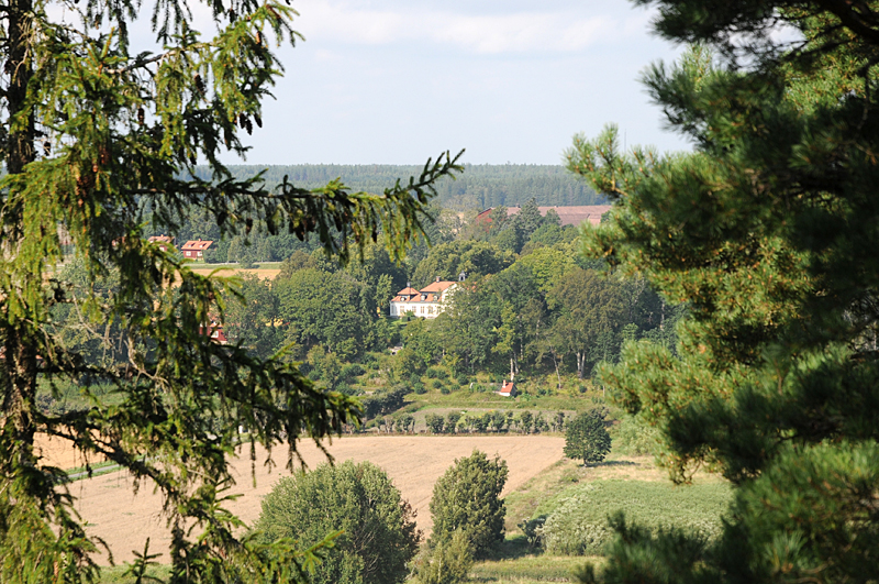 Berga-Tuna sett från Berga Kulle naturreservat.